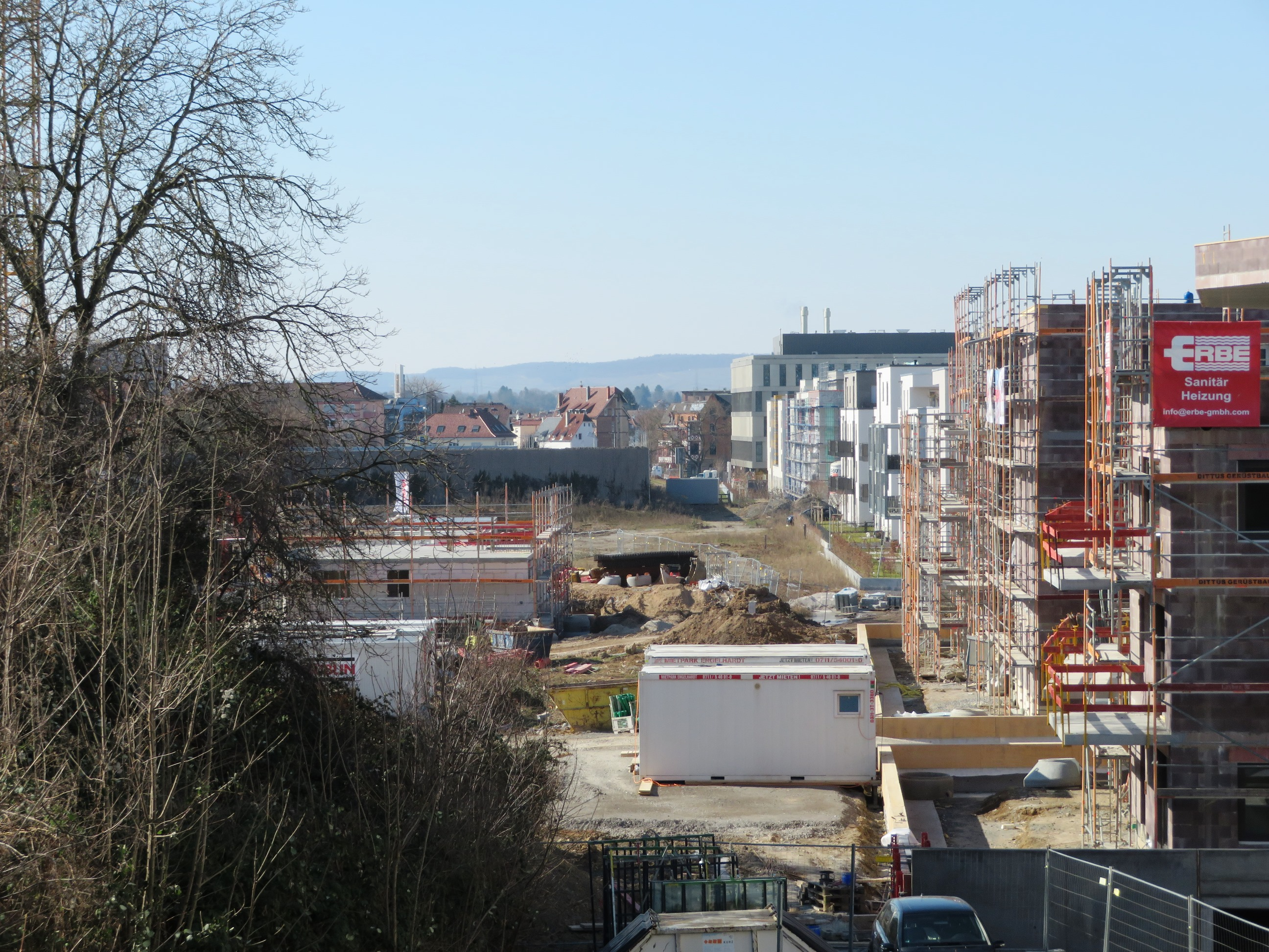 ehemaliges Südbahnhofgelände in Heilbronn